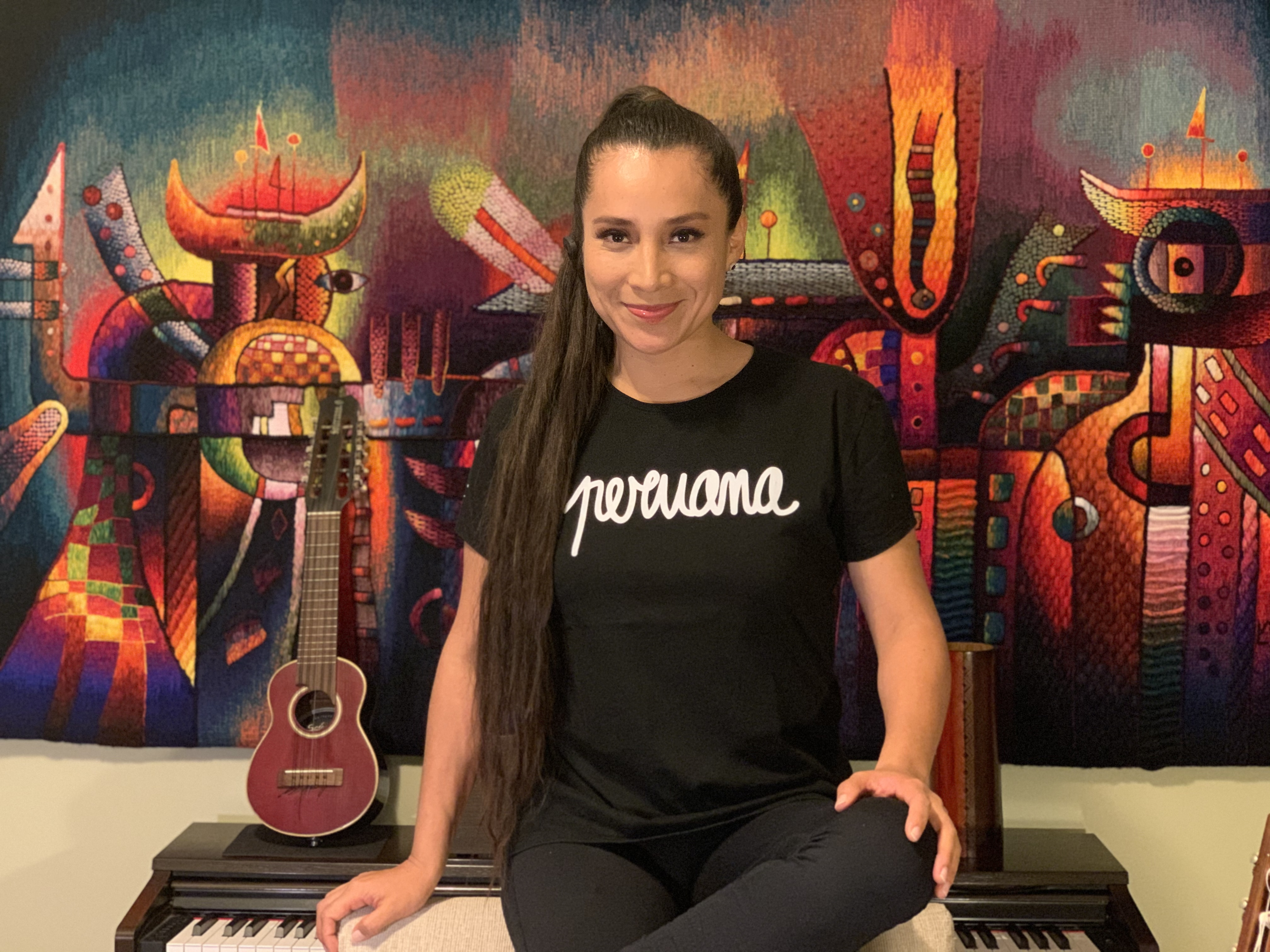 Foto actualizada de cantante